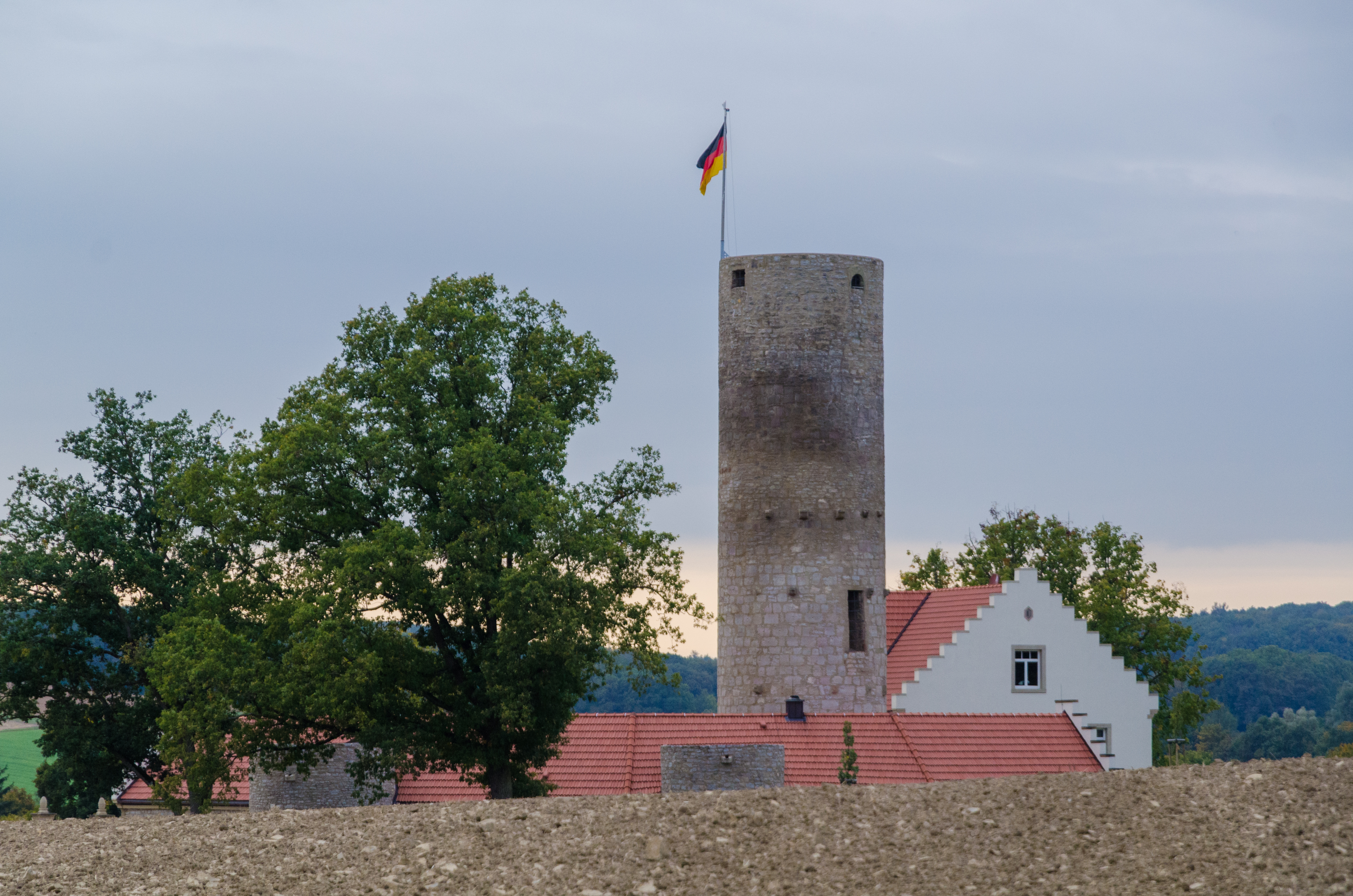 Arnstein, Büchold, Bergfried